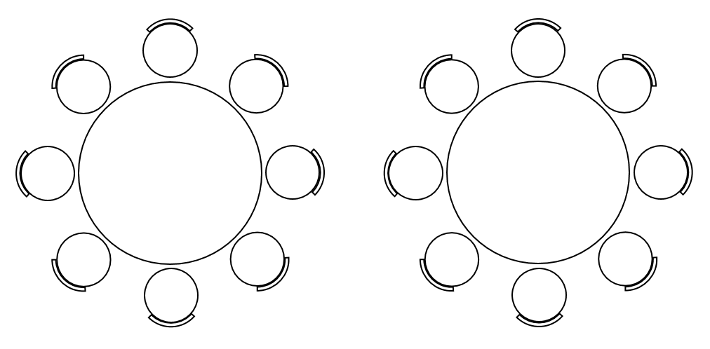 Bordoppsett Runde bord